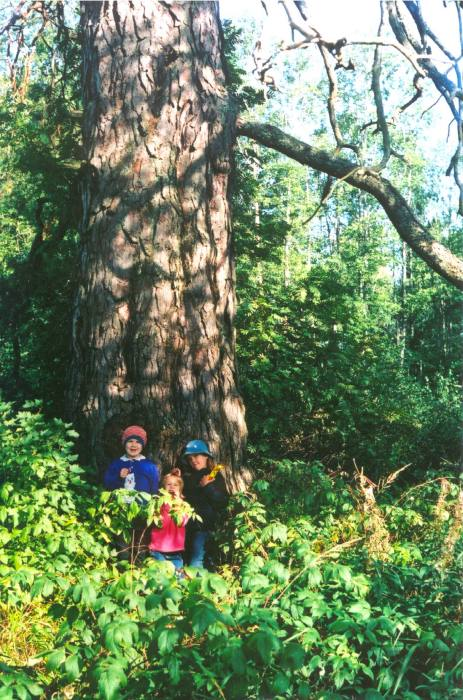 Puurmani vana mänd